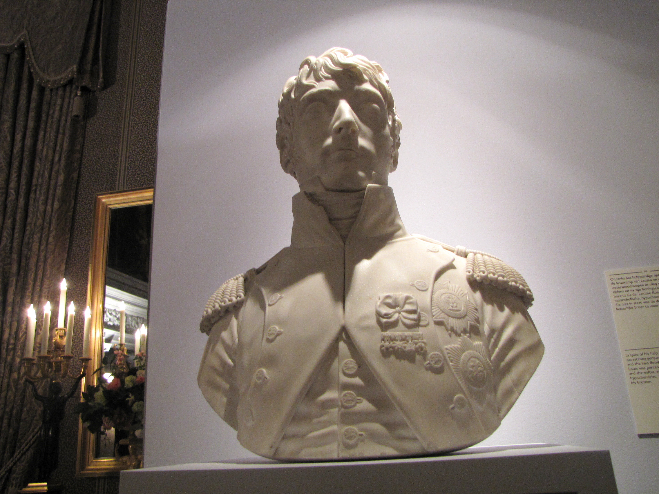 Tentoonstelling over Lodewijk Napoleon in het Paleis op de Dam. 'Lodewijk Napoleon, koning van Holland', door Pierre Cartellier, 1809.